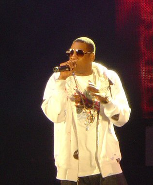 Jay-Z